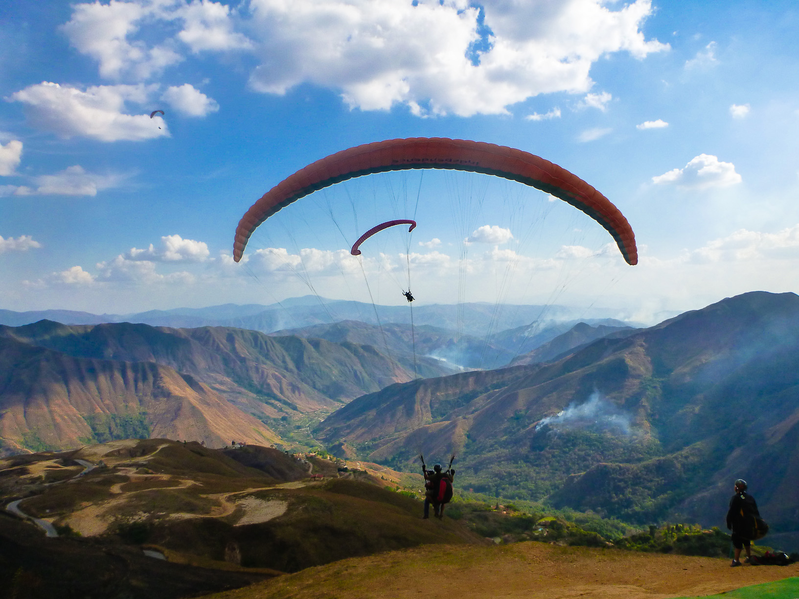 en la Colonia Tovar